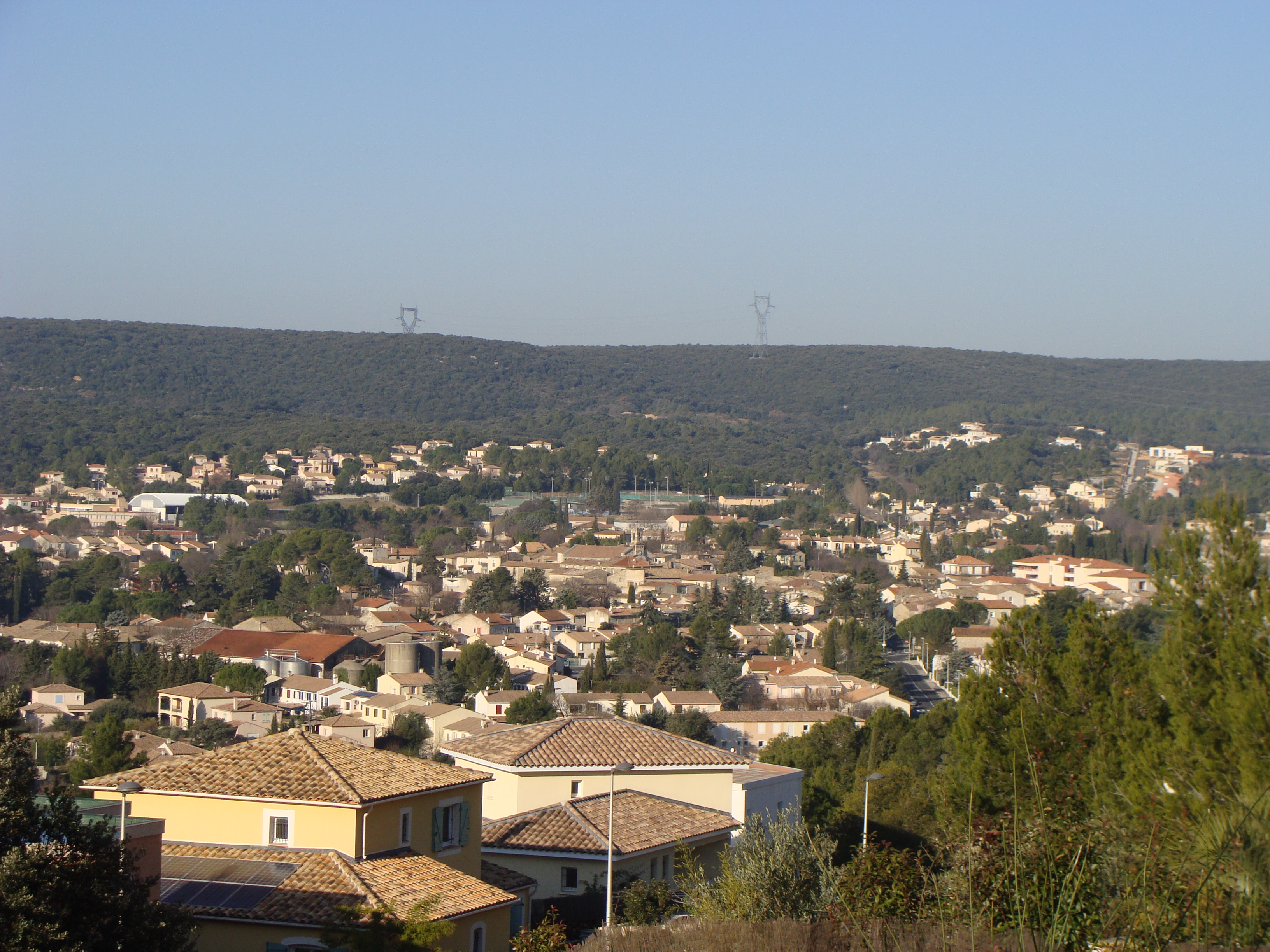 Le village de Saint-Gély-du-Fesc (Hérault).